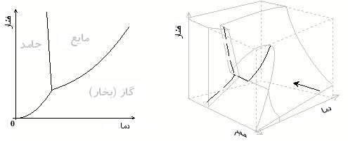 نحوه‌ی تصویر کردن نمودار فازی PVT بر روی PT و نمودار بدست آمده از آن